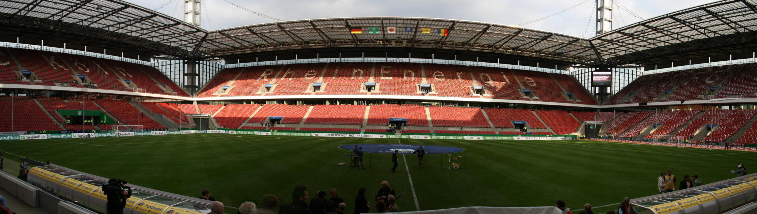 Panorama RheinEnergieStadion Köln von der Pressetribühne vor dem Länderspiel Deutschland - Rumänien